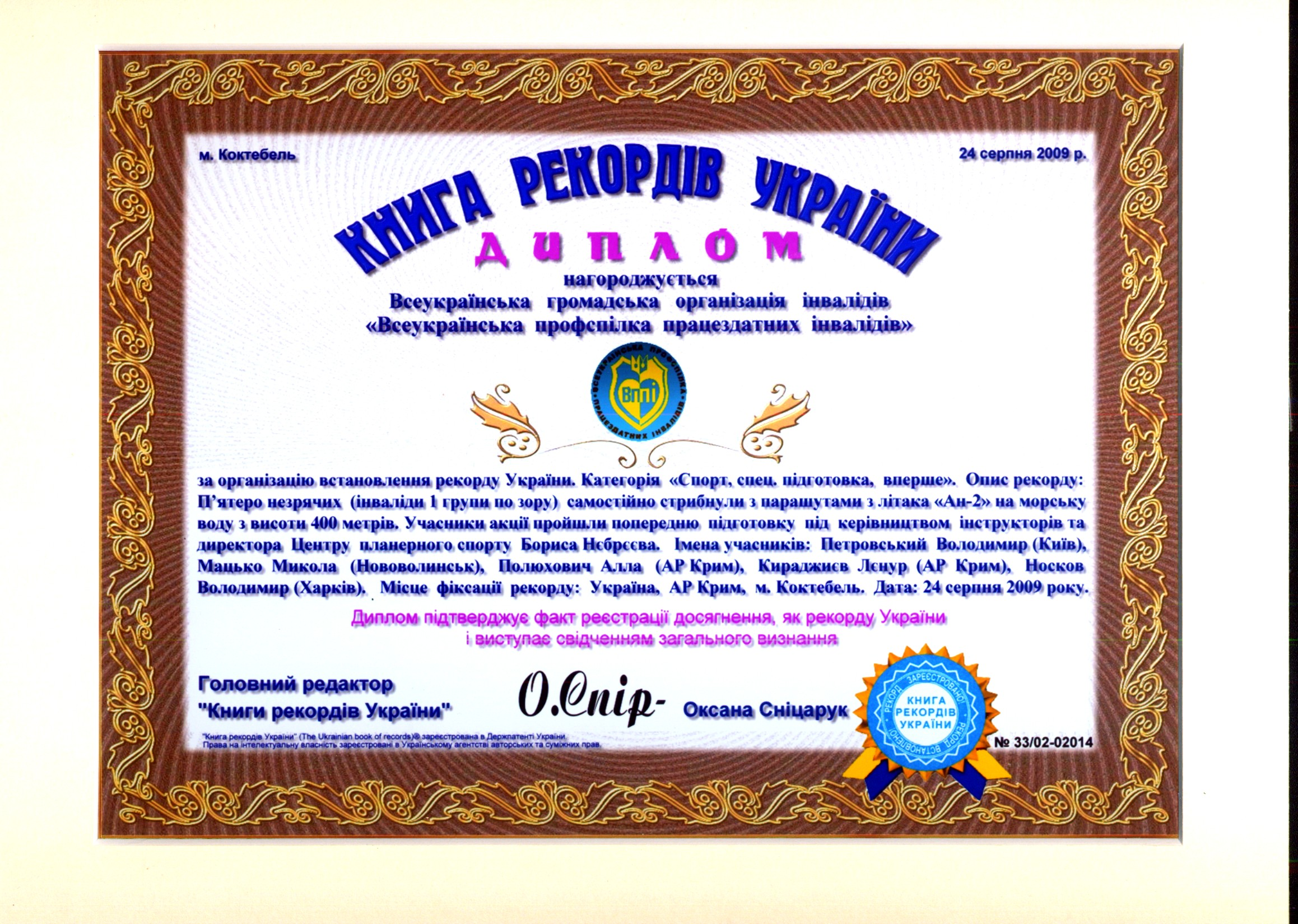 24 серпня 2009 року, в День Незалежності України, п`ятеро незрячих українців встановили світовий рекорд, стрибнувши з парашутом без інструктора, не в тандемі на морську воду. Інціатором, організатором і одним з учасників акції "Небо - для вільних" був В.Б. Петровський. Рекорд зафіксований Книгою рекордів України